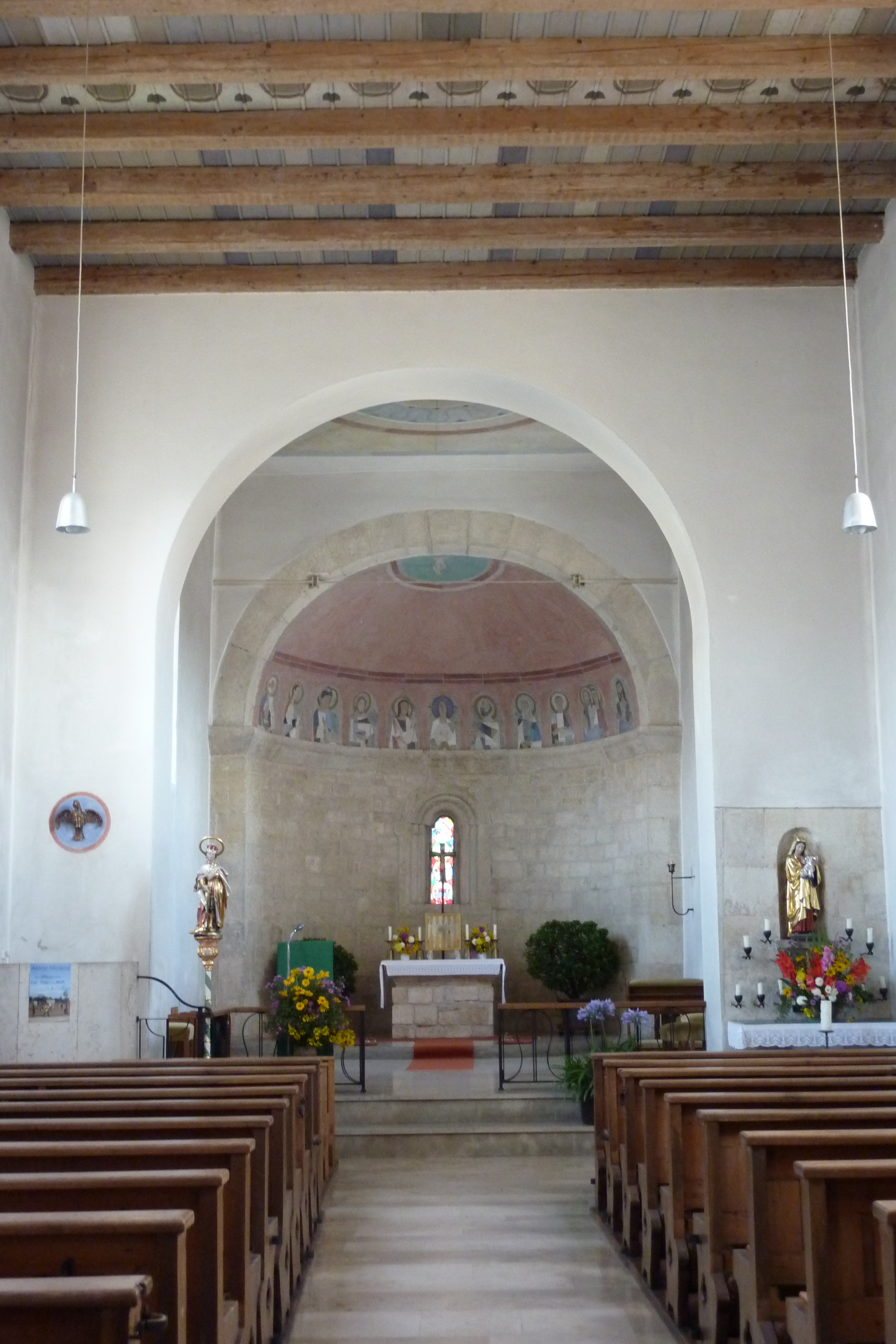 Katholische Pfarrkirche St. Vitus in Reistingen (Gemeinde Ziertheim), Innenraum mit Blick zur romanischen Apsis mit Fresken von 1954 von Franz Nagel